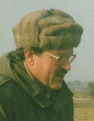 Porträt Manfred Fraider, ehemaliges Mitglied Hamburger Bürgerschaft